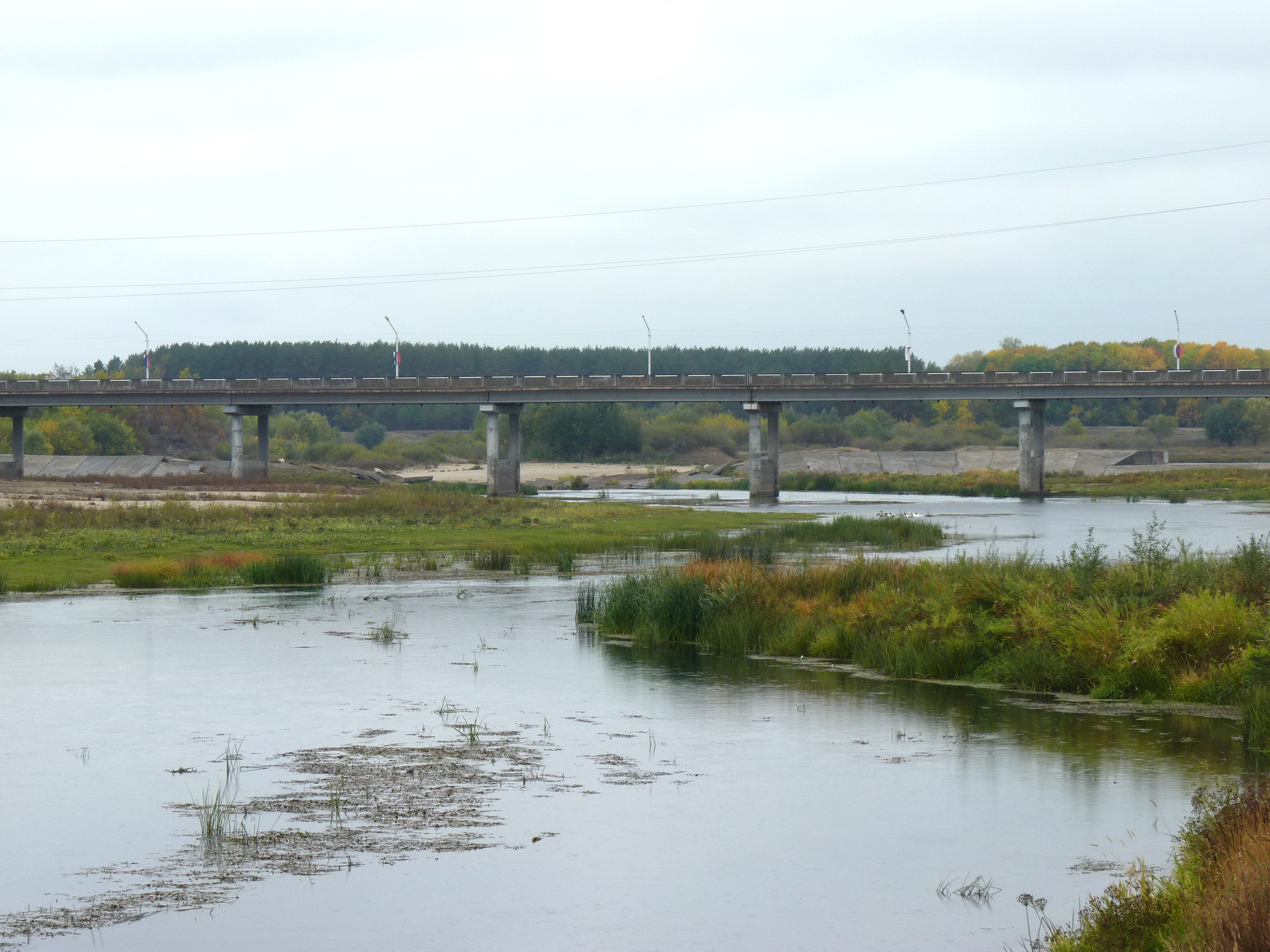 Мост через реку Хопёр в посёлке Беково. Пензенская область. 2010 год